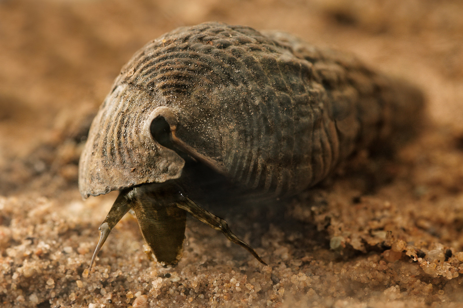 Terebralia palustris